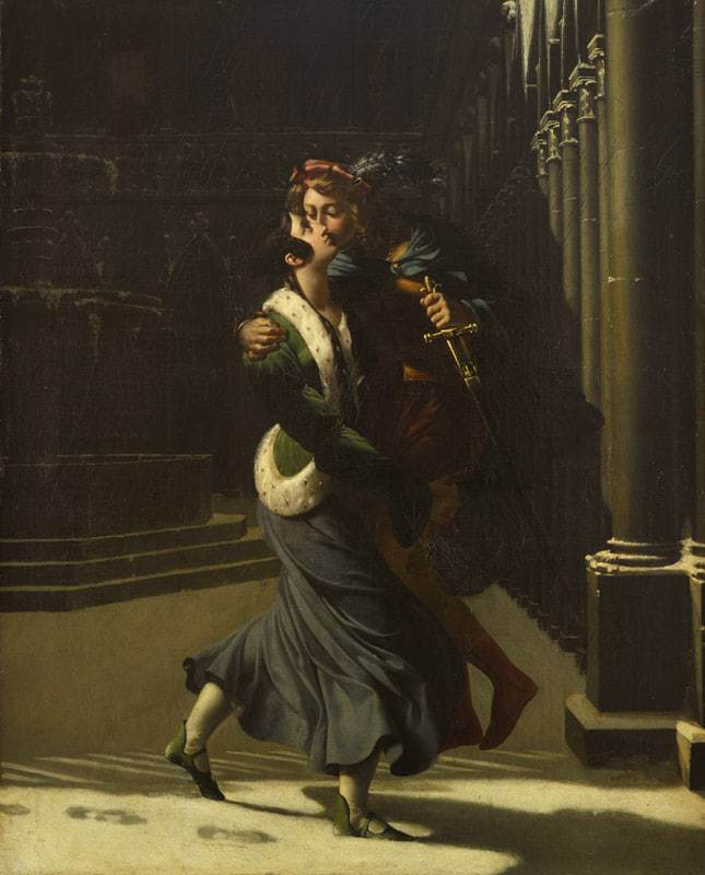 Emma et Eginhard, 1804, Pierre Antoine Augustin Vafflard, Musée d'Évreux